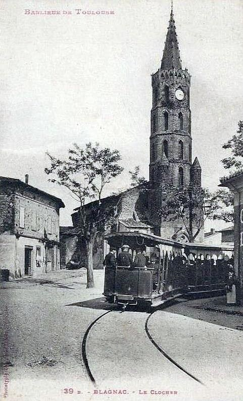 Blagnac, le tramway passe devant l'église (1910).